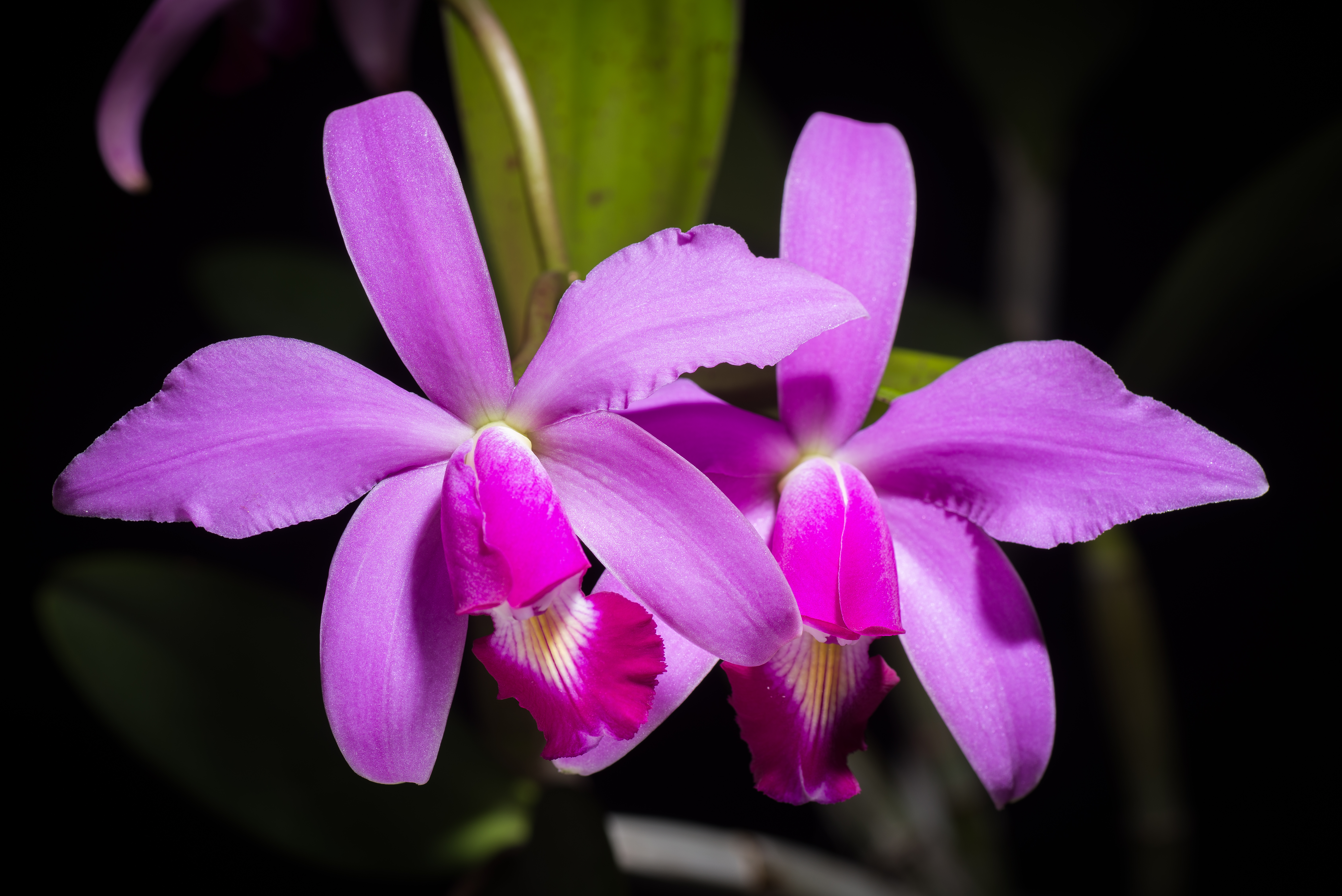 Cattleya violacea - Brazil